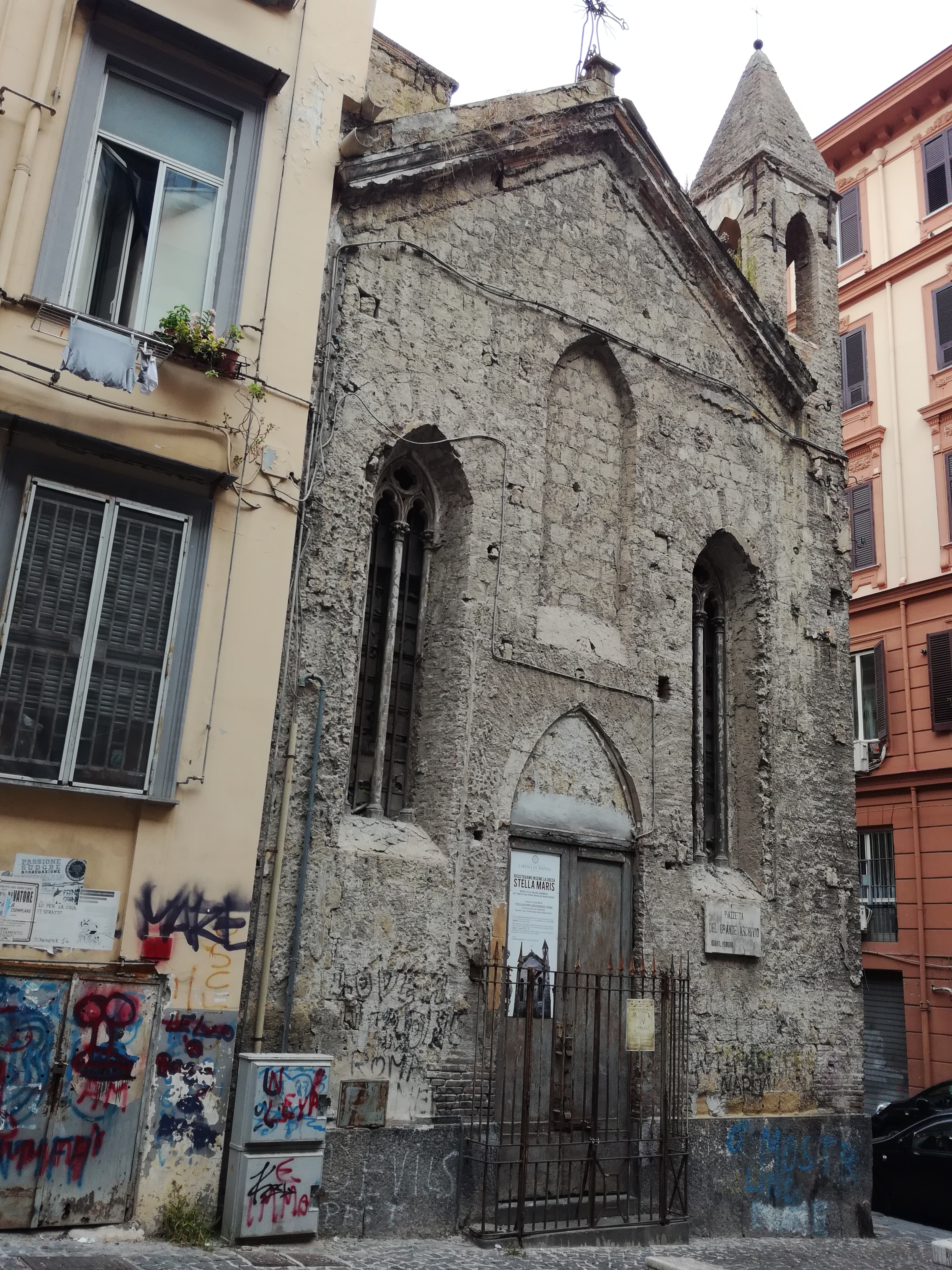 Chiesa gotica di Santa Maria Stella del Mare (o Santa Patrizia) a Napoli.